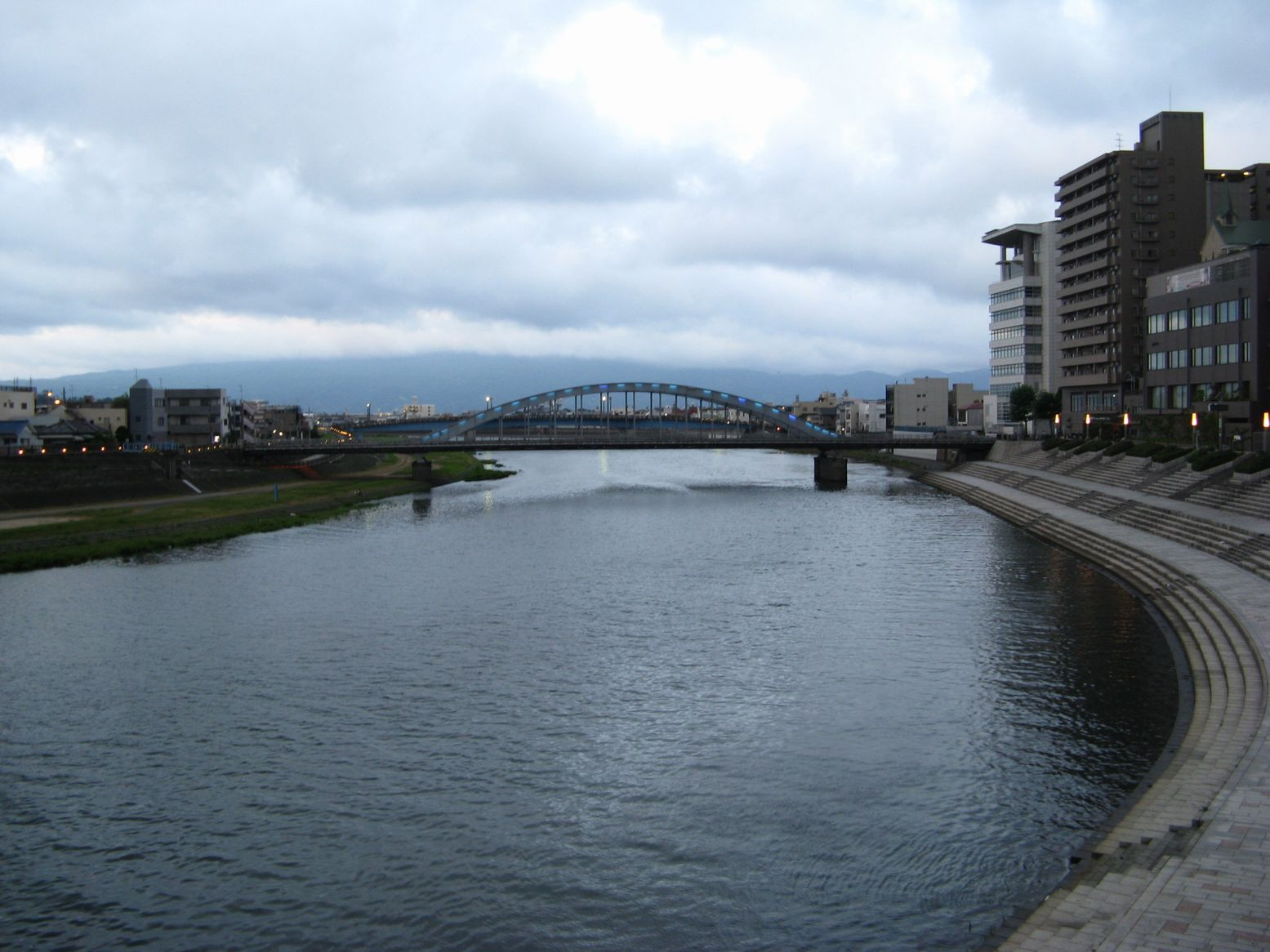 Kano River at Numazu, Shizuoka, Japan